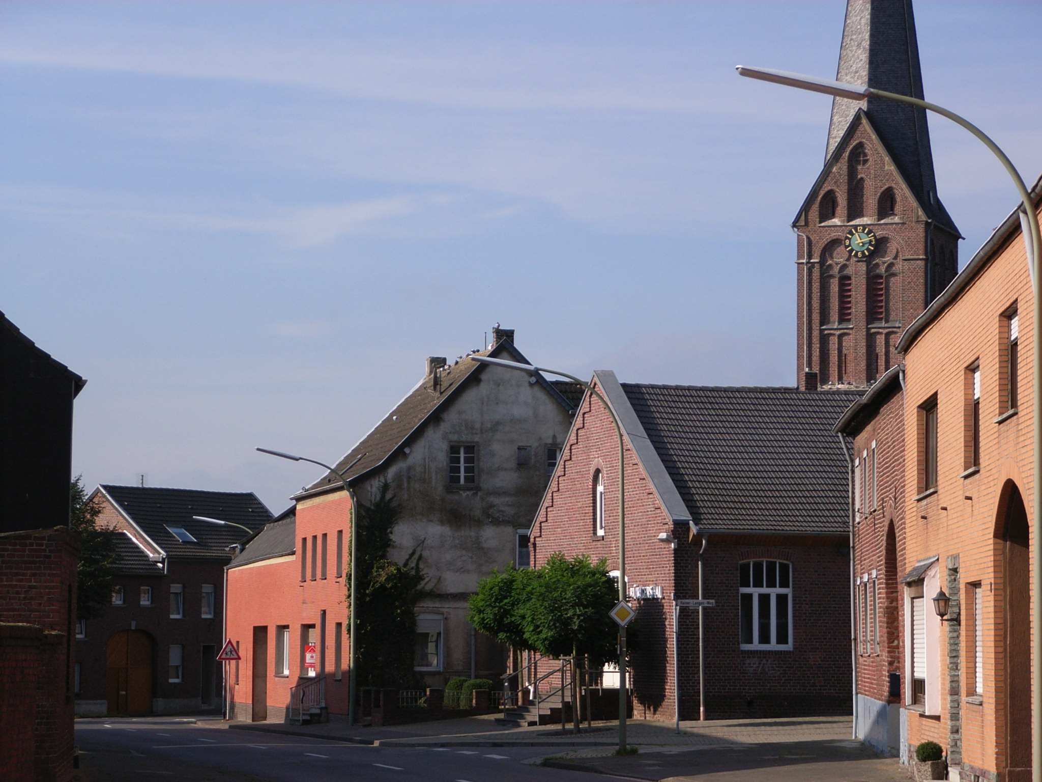 Summary Bildbeschreibung: Ortsdurchfahrt Katzem mit Bürgersaal und Pfarrkirche Quelle: eigens Foto Fotograf/Zeichner: bodoklecksel 20:52, 25. Mär 2006 (CET), New Version October 2006 Datum: März 2006 Sonstiges: ...